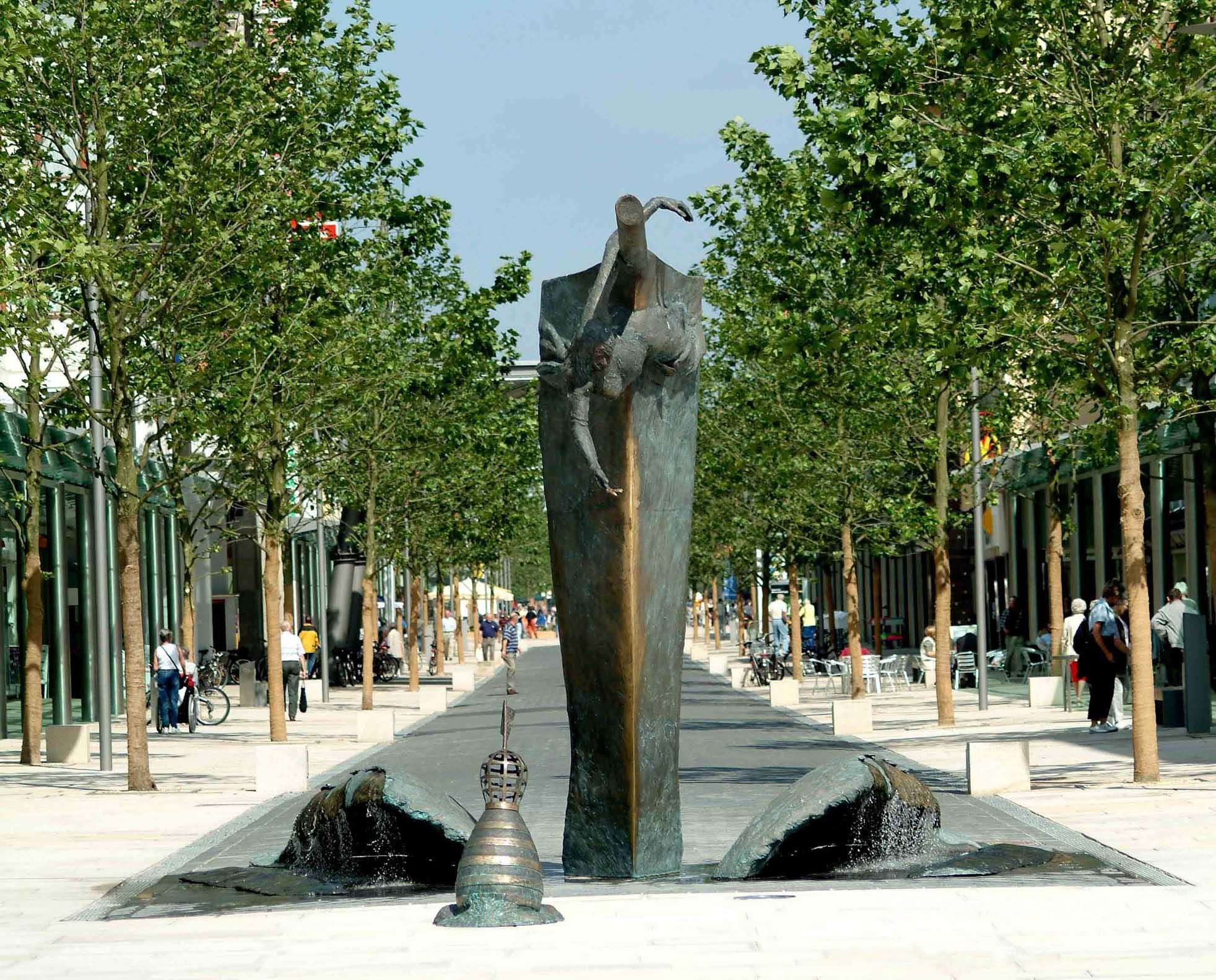 Brunnenskulptur "Bugwelle", Innenstadt Bremerhaven